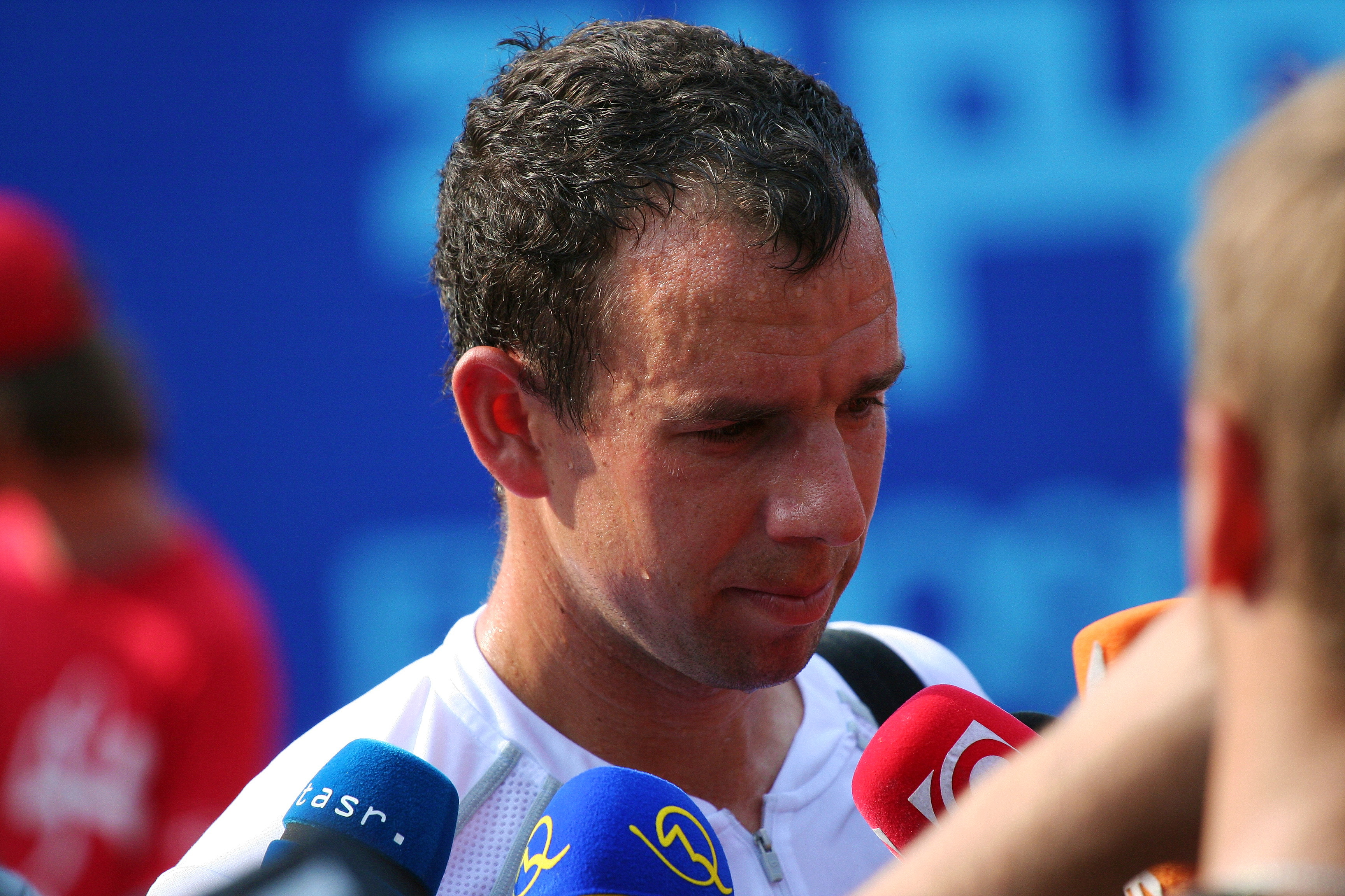 Dominik Hrbatý po zápase 1. kola na Košice Open 2011